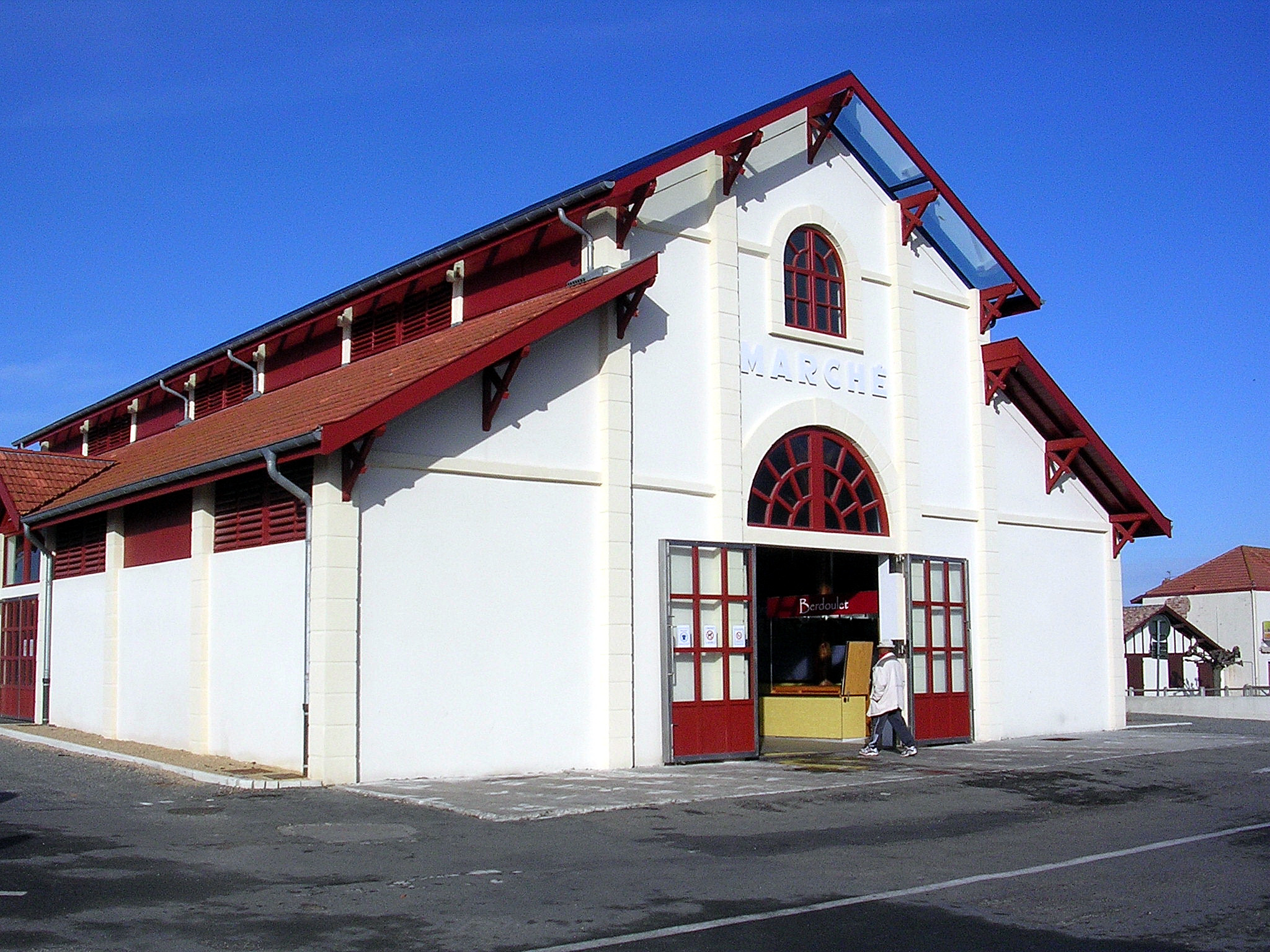 Marché couvert restauré de Mimizan-plagen dans le département français des Landes